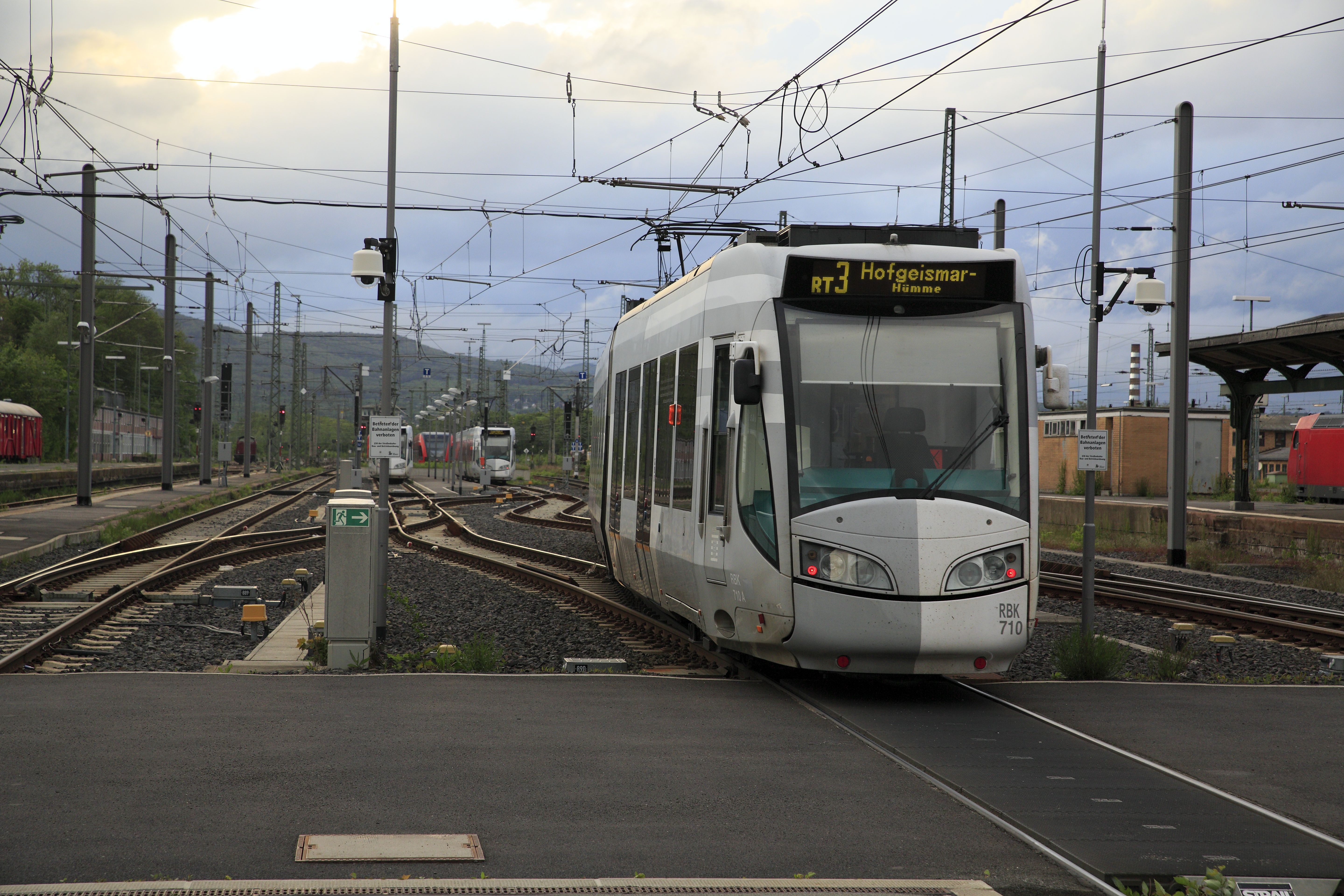 Zug der Linie RT 3 nach Hofgeismar-Hümme bei der Ausfahrt in Richtung Systemwechselstelle, Nachschuss.